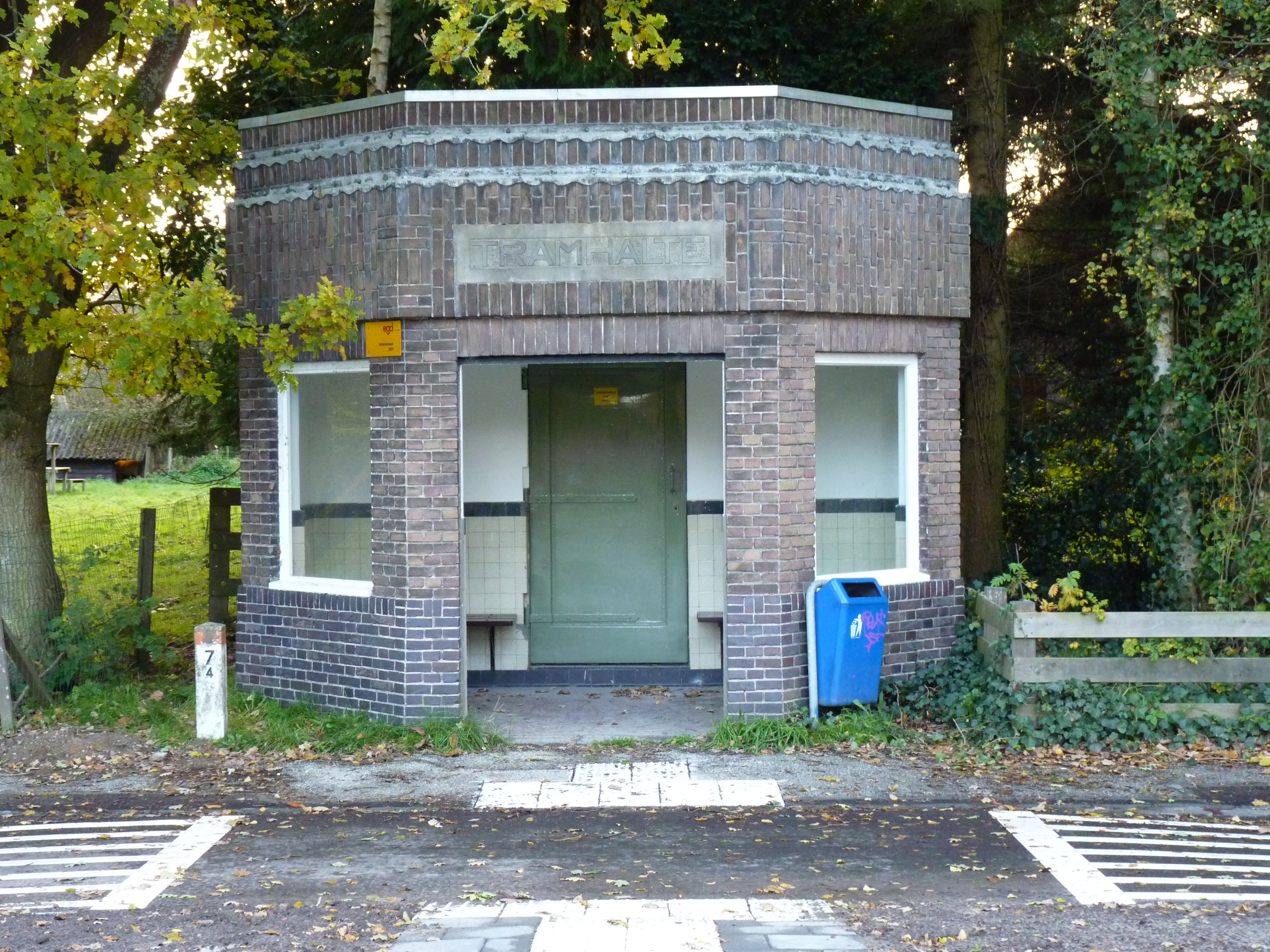 Haren Tramwachthuisje en Transformatorgebouw